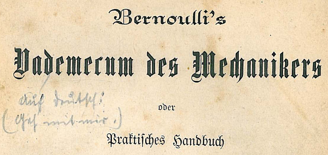 Bernouillis Vademecum des Mechanikers